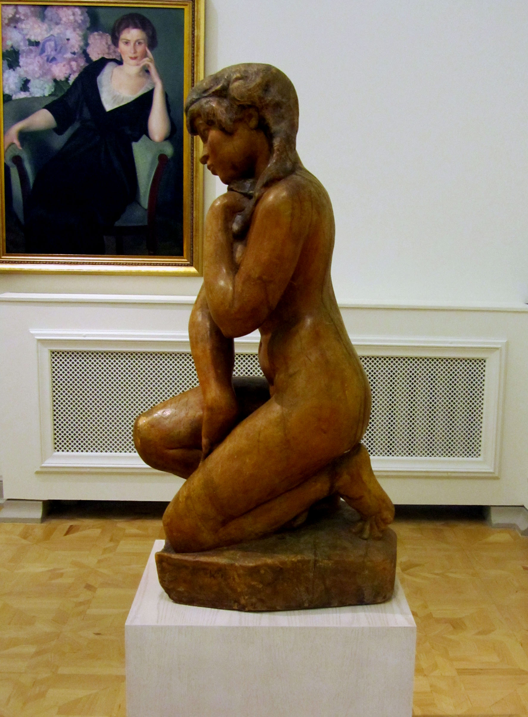 Escultura en madera "Bañista" realizada en 1917 por Sergey Konenkov conservada en el Mureo Ruso de San Petersburgo